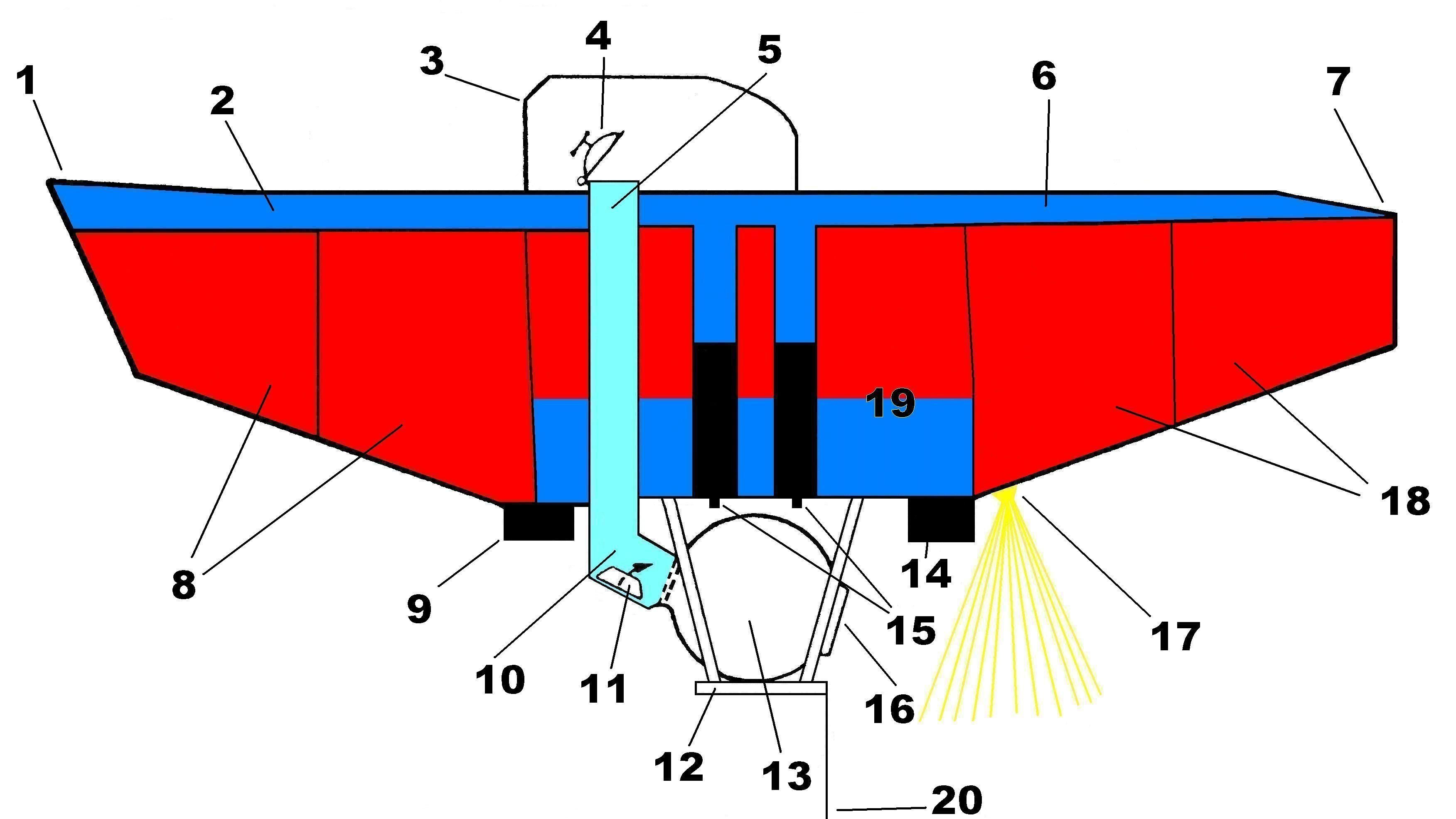 FNRS-3